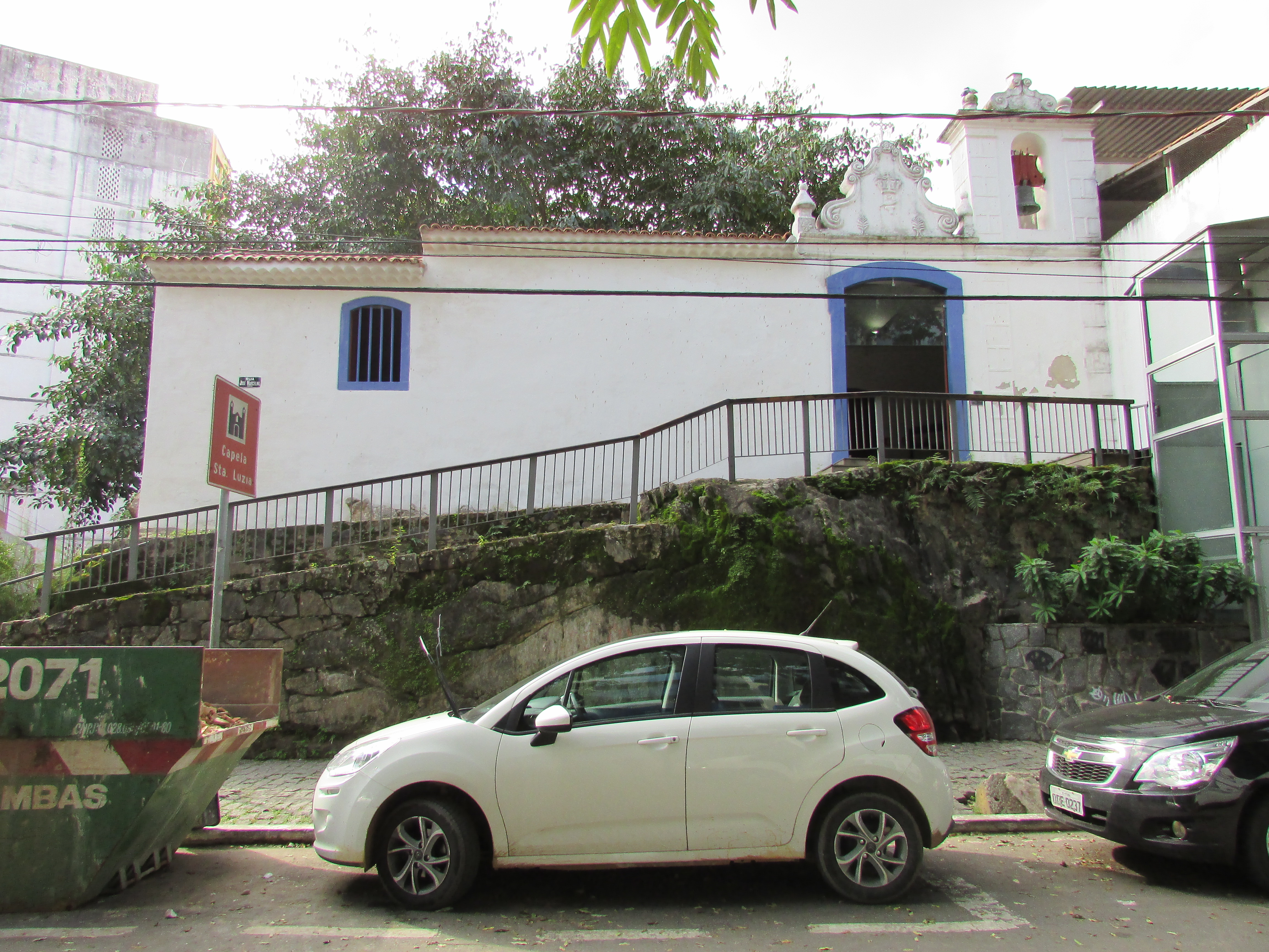 Igreja de Santa Luzia